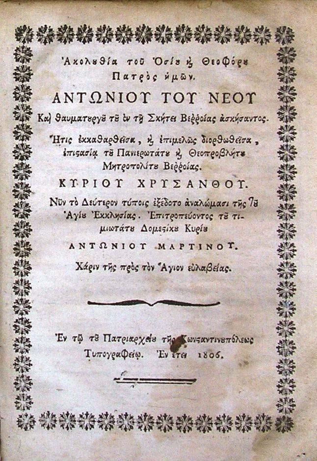 Житие на Свети Антоний Нови Берски